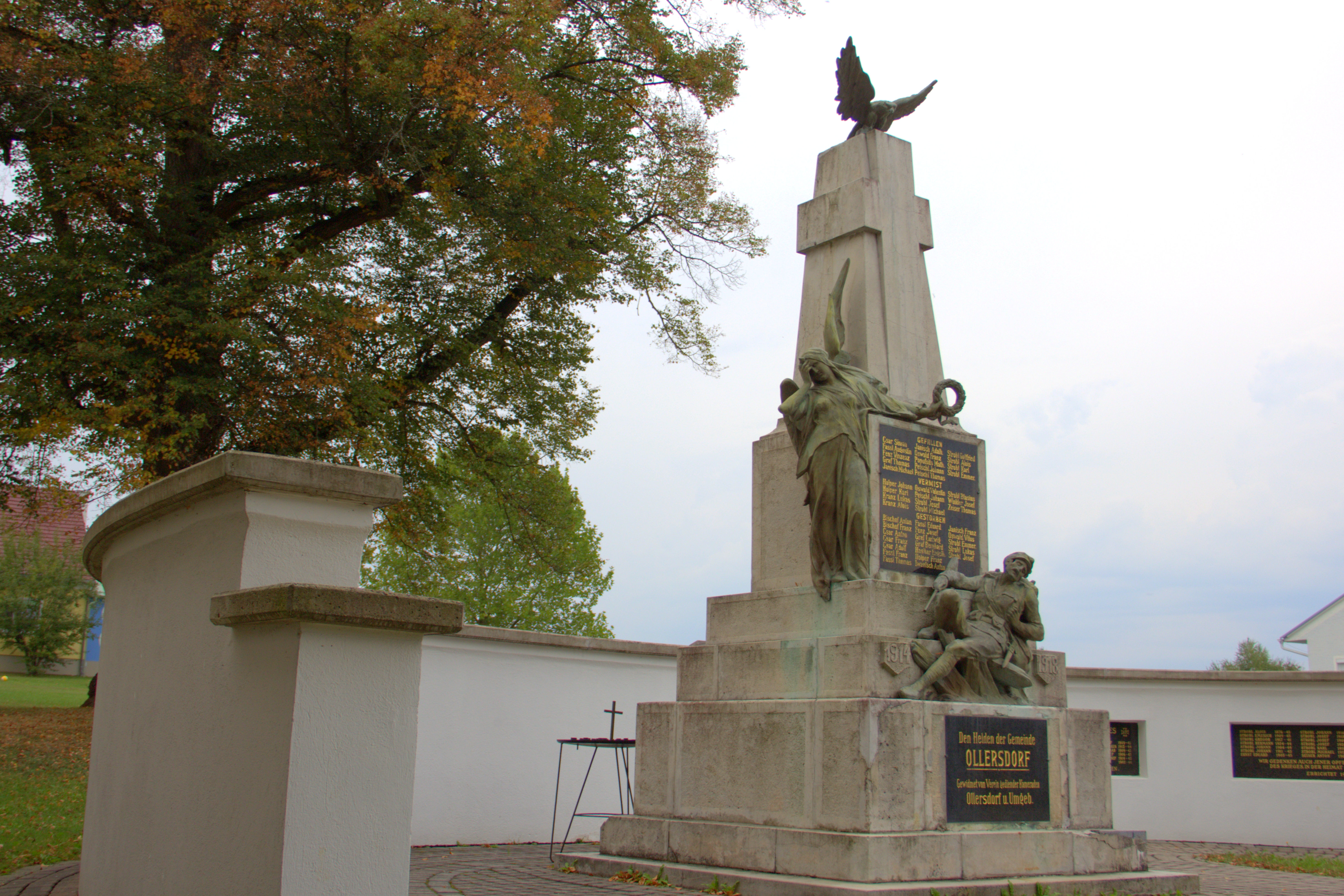 Kriegerdenkmal Ollerdorf